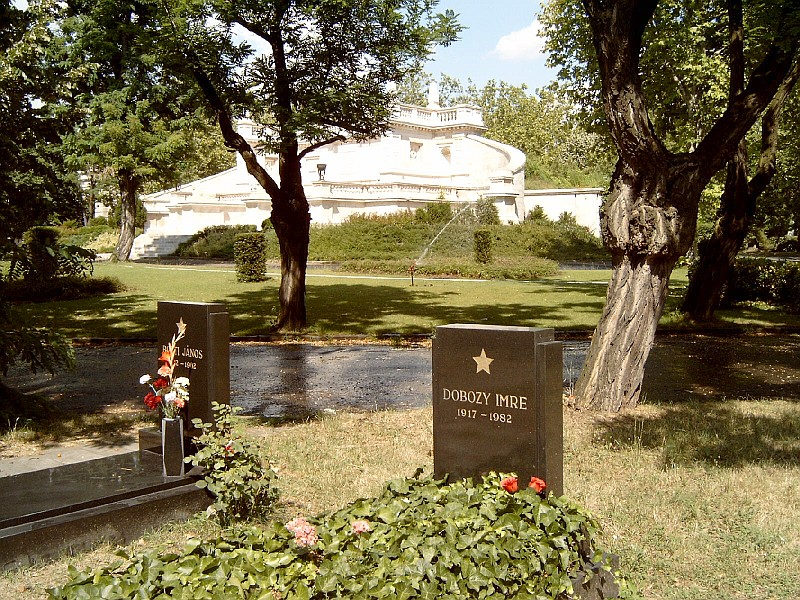 Dobozy Imre sírja Budapesten. Kerepesi temető: 12-2-2.